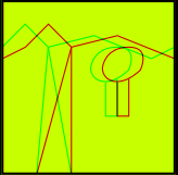 Ein kleines Stereogramm in Anaglyphentechnik.